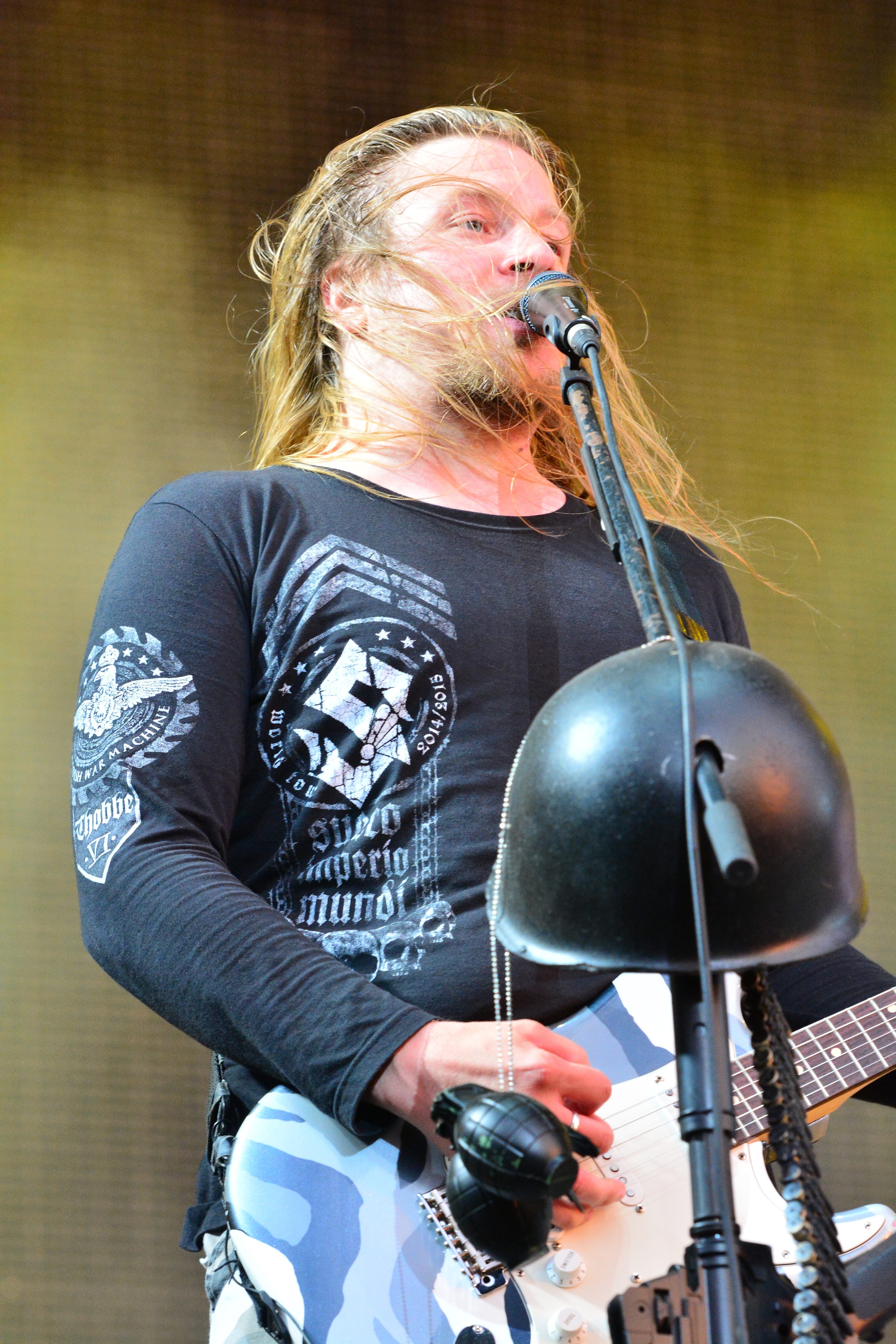 Sabaton beim Wacken Open Air 2015